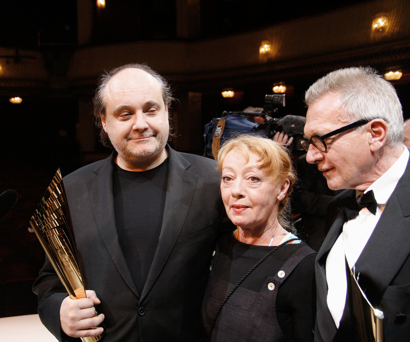 Paulus Manker (Publikumspreis), Ulrike Kaufmann (Lebenswerk) und Erwin Piplits (Lebenswerk) bei der Verleihung des Nestroy-Theaterpreises 2010 im Burgtheater in Wien.